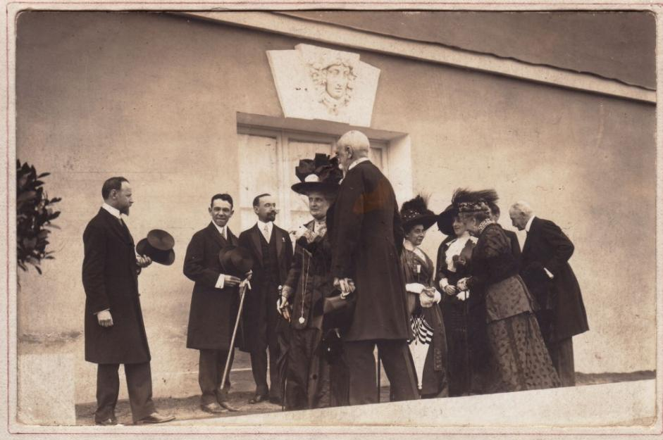 Э.О. Визеля представляют королеве Италии